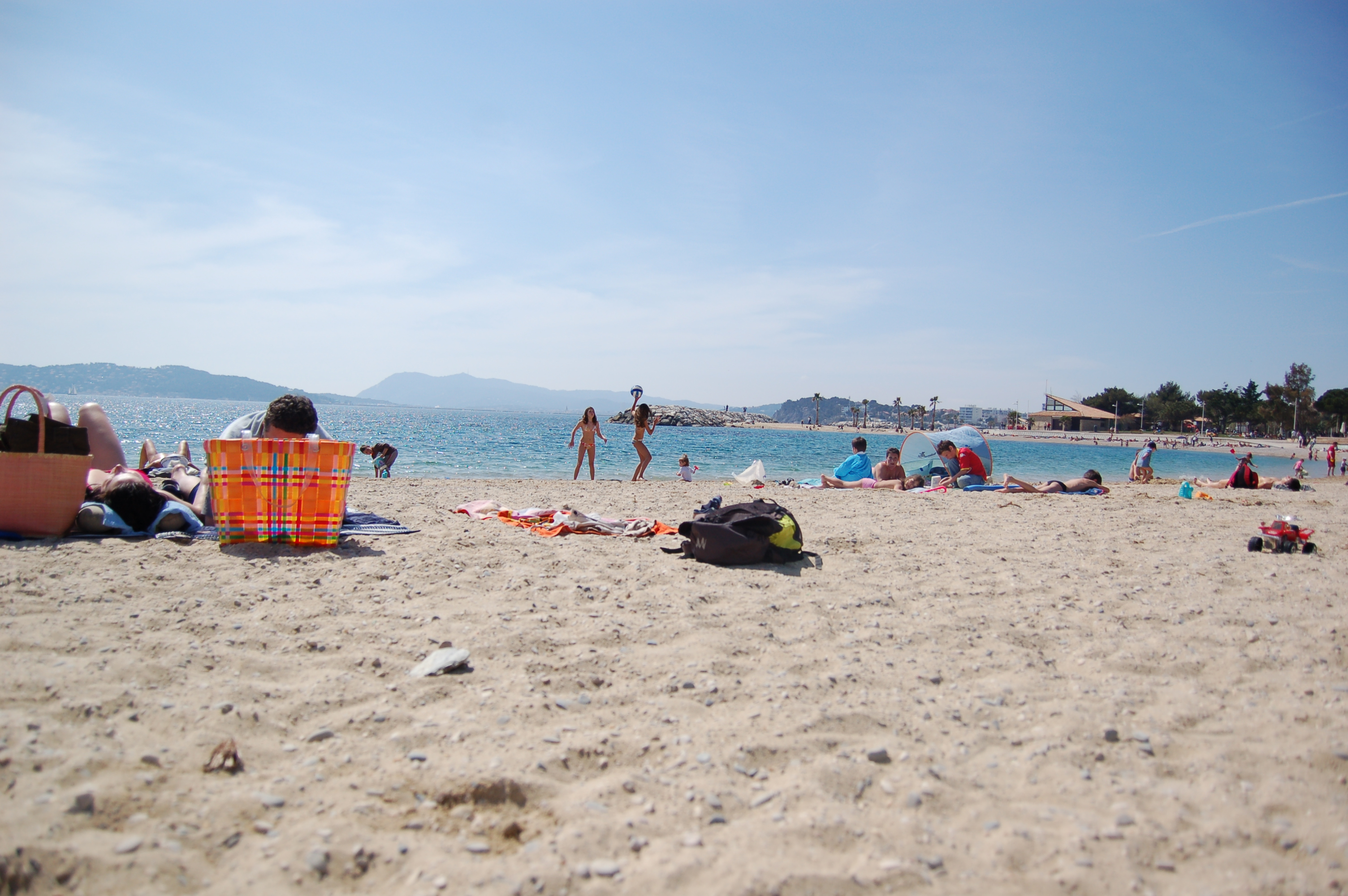 Plage de Toulon Pris à Toulon (France) Avril 2007